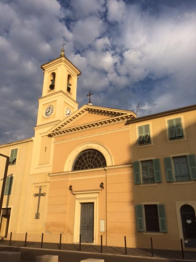 EGLISE EXTERIEURE